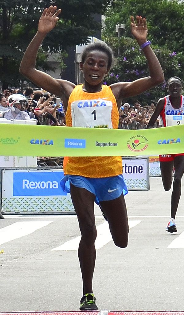 São Paulo - A etíope Wude Aylew Yimer com o tempo de 54m01s, foi a campeã, entre as mulheres, da 91ª Corrida Internacional de São Silvestre (Rovena Rosa/Agência Brasil)